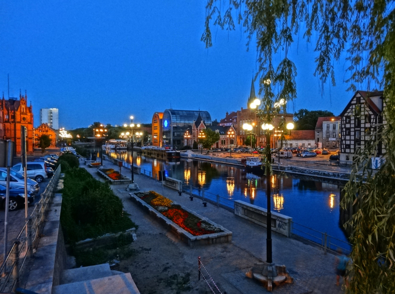 Nabrzeże Brdy w centrum Bydgoszczy